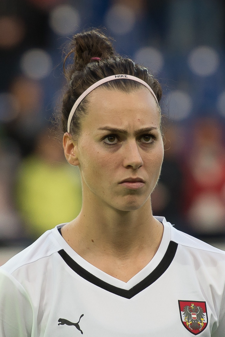 FIFA Women's World Cup 2015: Qualifying Round St. Pölten, 13.09.2014 Viktoria Schnaderbeck